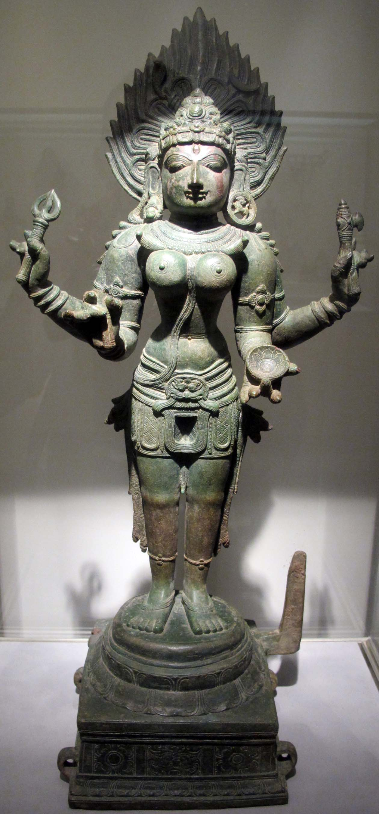 Tamil nadu, epoca cola, kali, xii sec